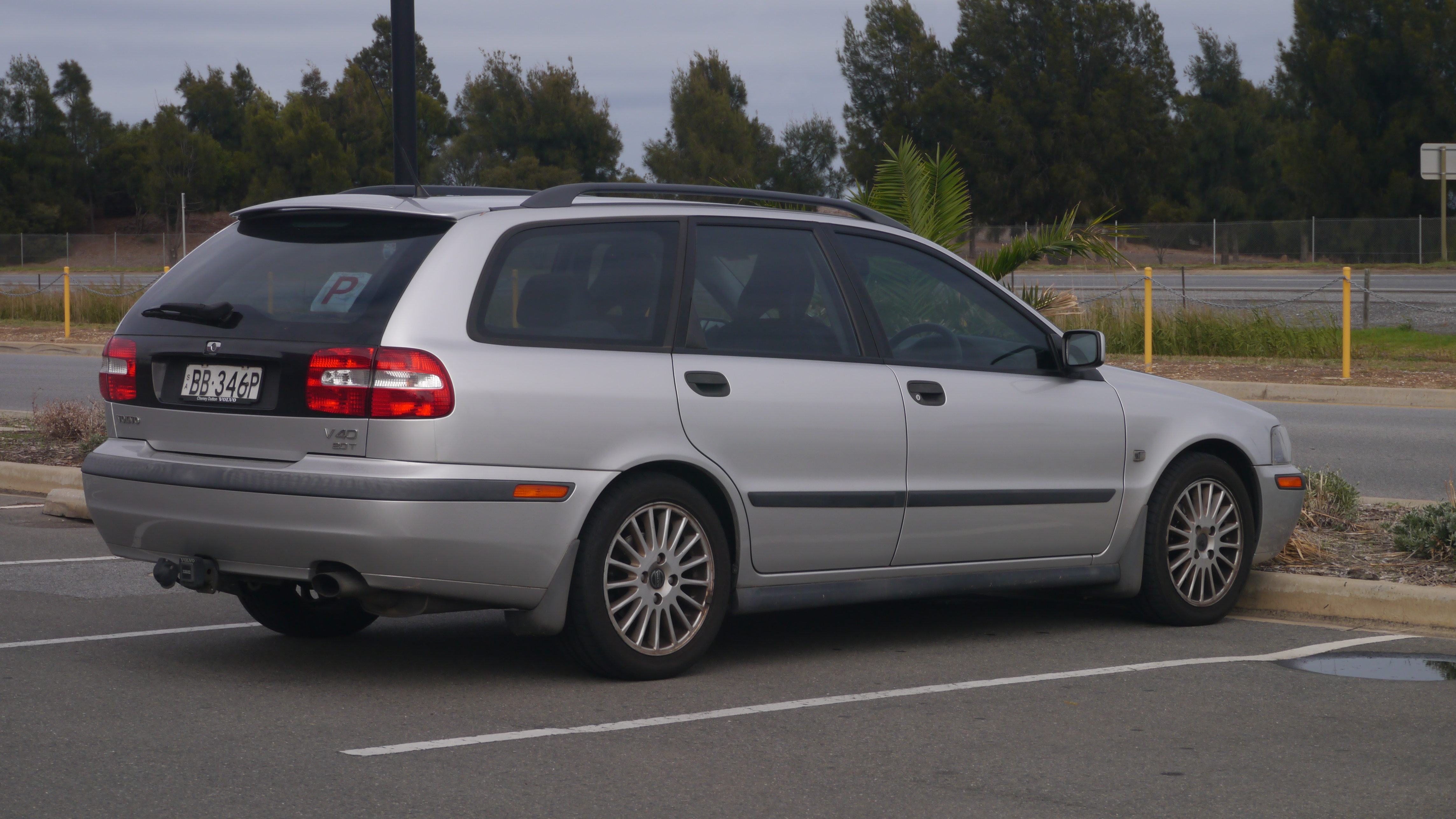 Volvo V40 2.0T